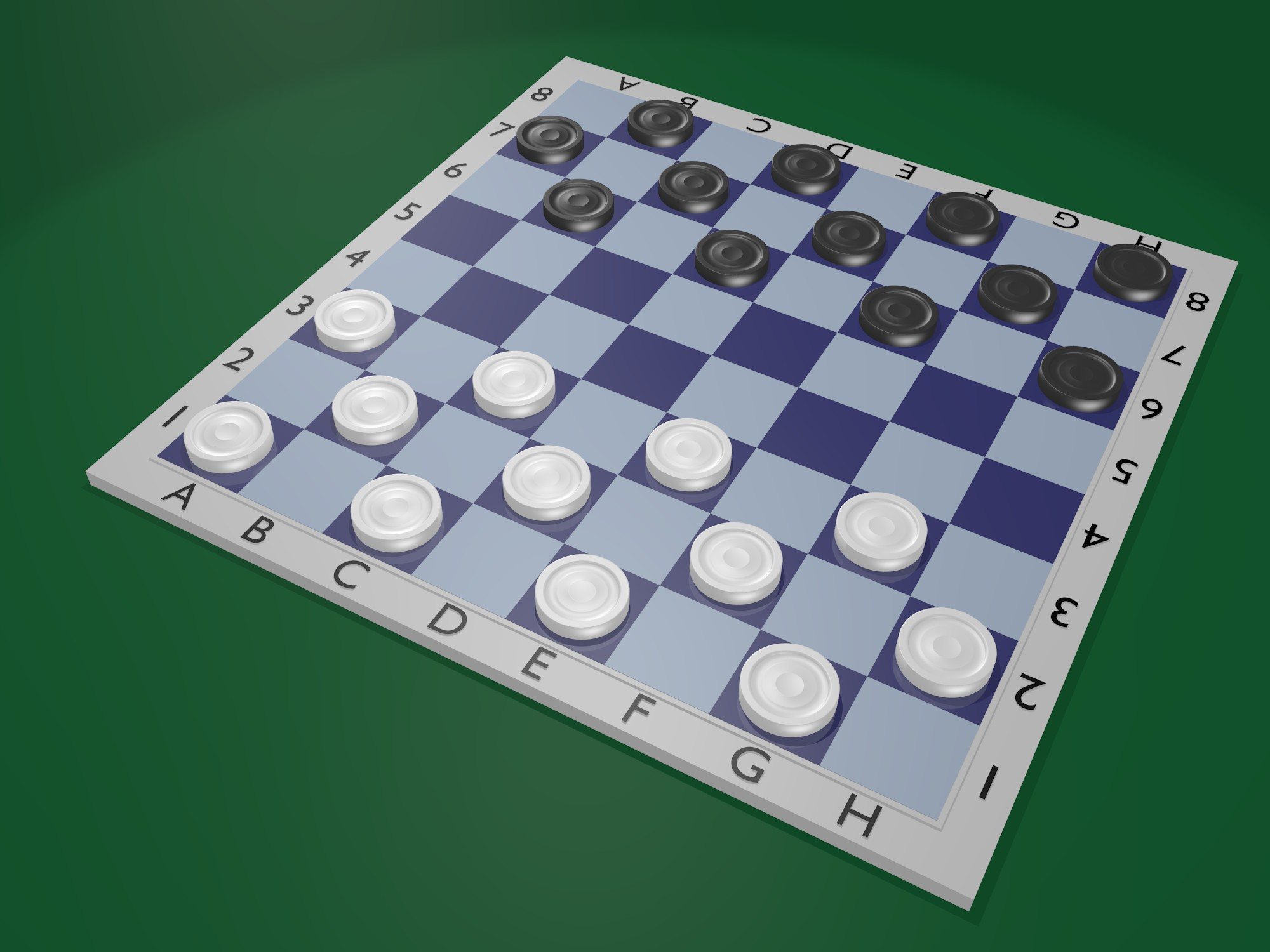 Начальная позиция при игре в русские шашки